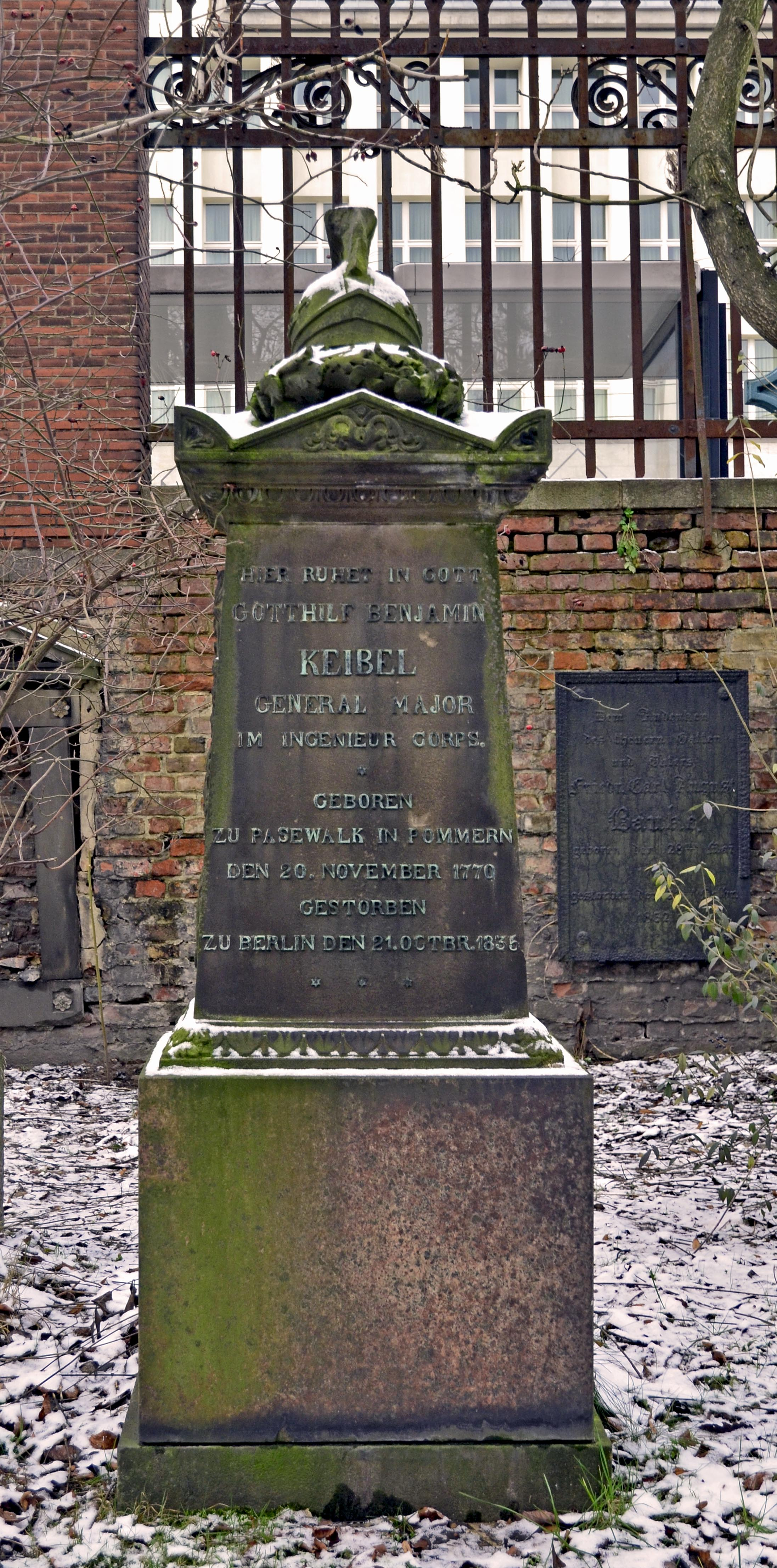 Gotthilf Benjamin Keibel - Grabstein auf dem "St.-Marien- und St.-Nikolai-Friedhof I" in Berlin, Prenzlauer Berg, Januar 2013